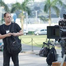 José Paulo Lanyi em seu trabalho no cinema.